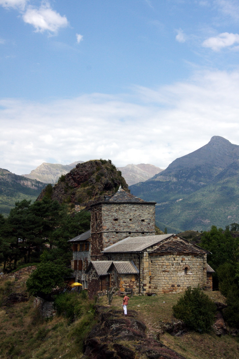 Església de Sant Andreu a Sos (la Franja-Osca)